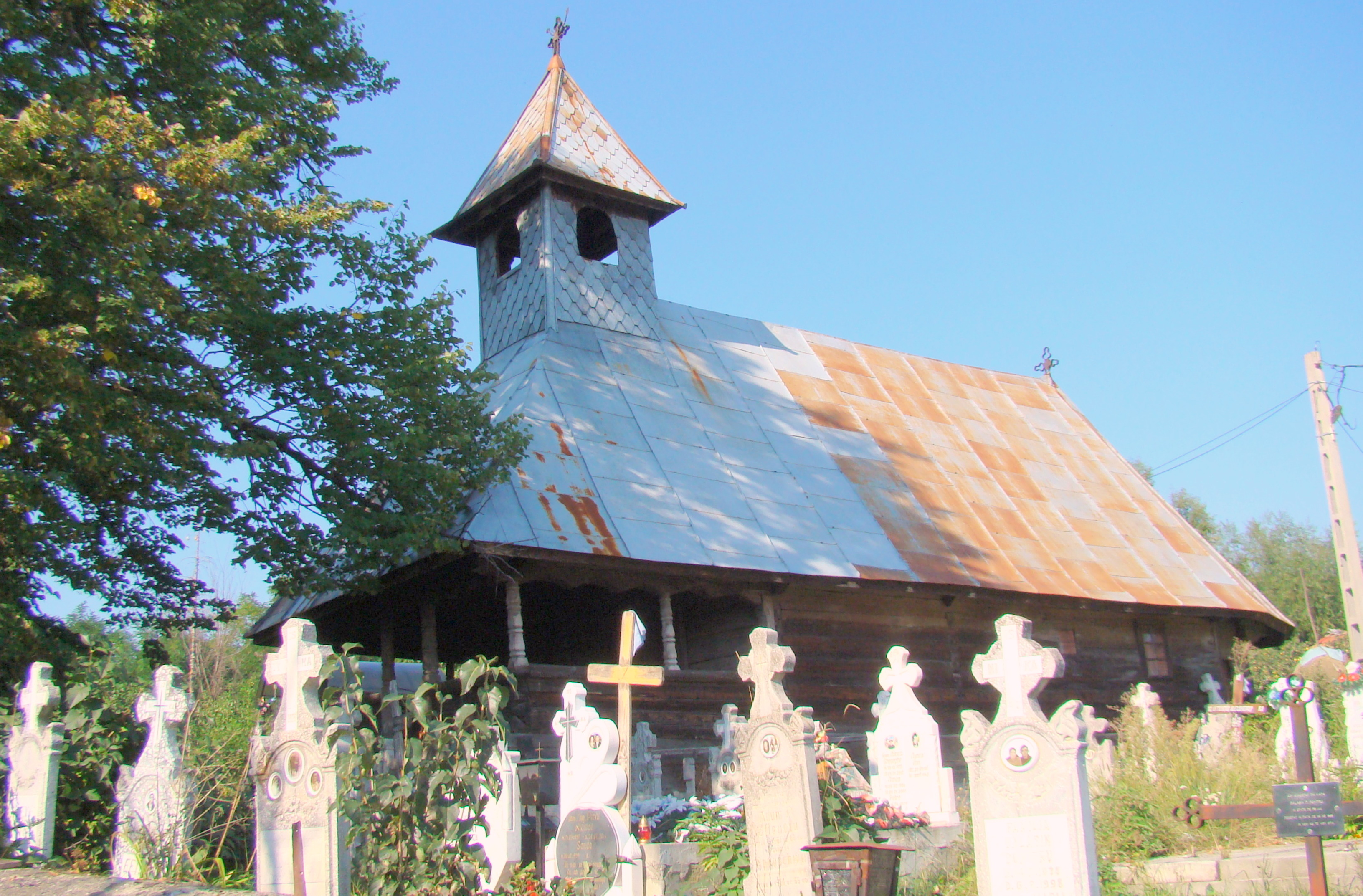 Biserica de lemn „Adormirea Maicii Domnului”, sat Curpen; comuna Stănești